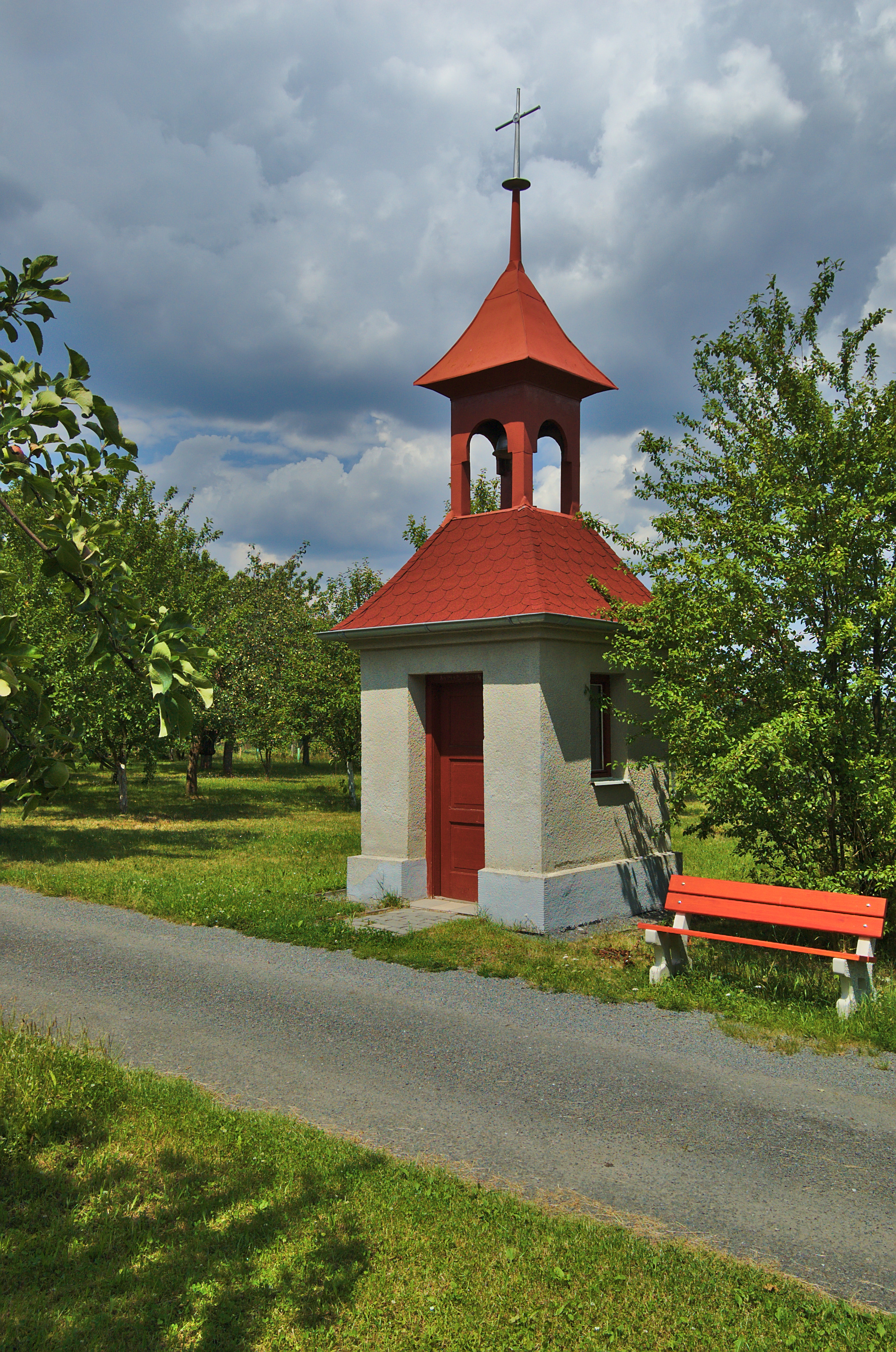 Kaplička, Holubice, Ptení, okres Prostějov